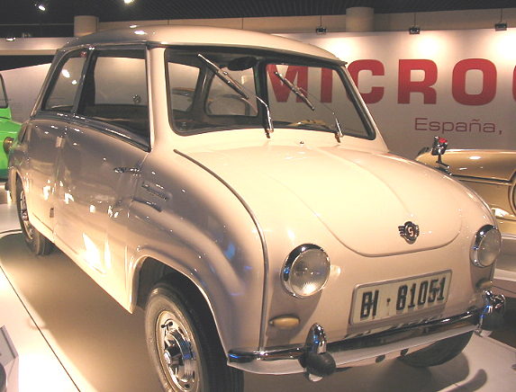 Fotografía de Pablo Alberto Salguero Quiles